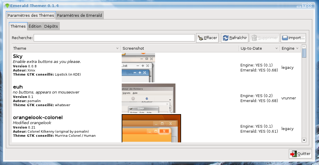 Le gestionnaire de thèmes d'Emerald (décorateur de fenêtre de Beryl)